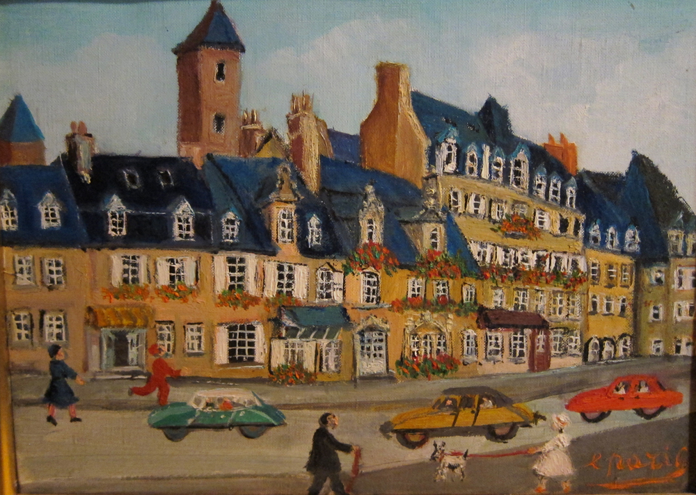 Roscoff 1961huile 22 x 16 cm Grand'Mère Paris